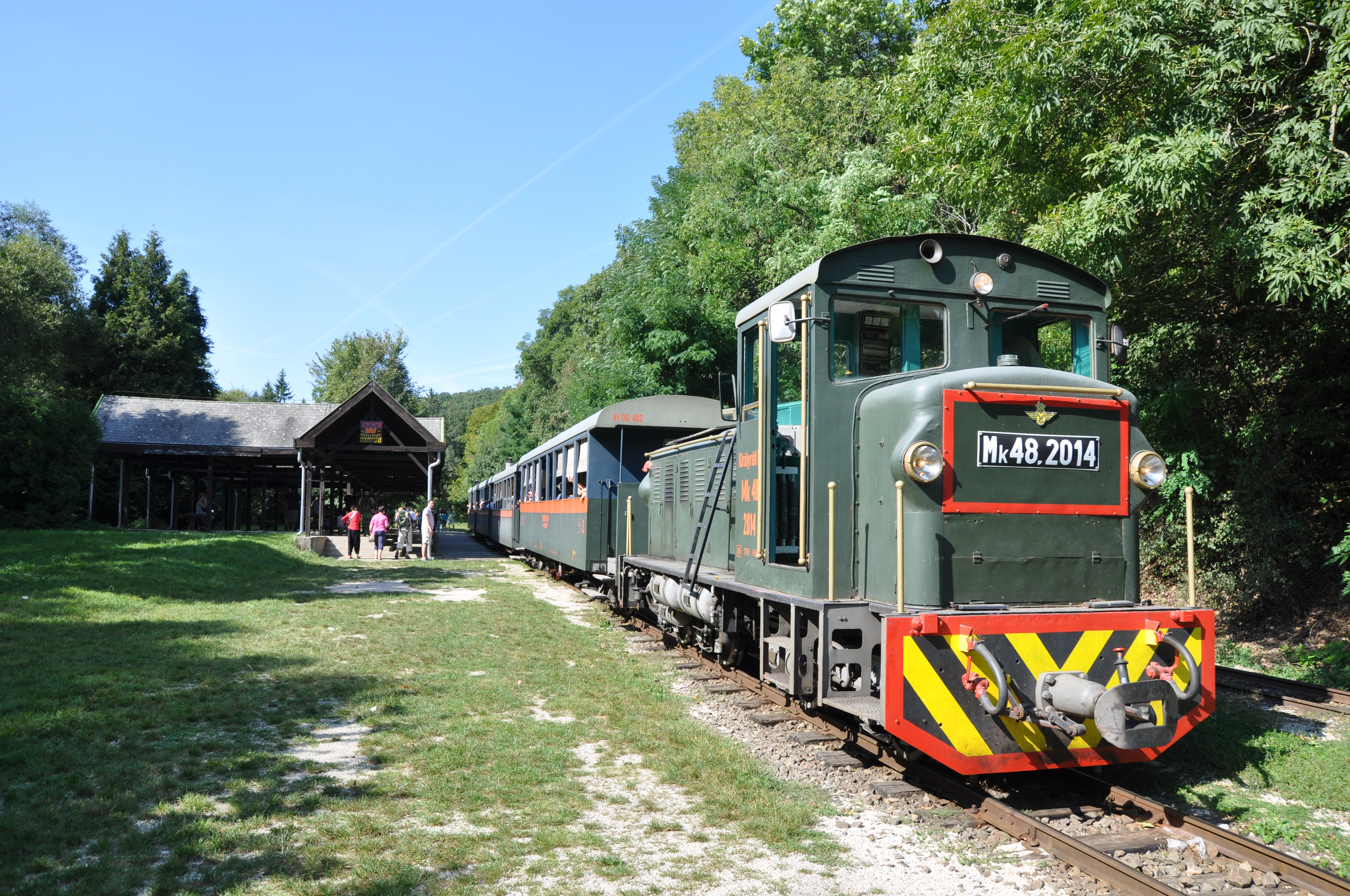 Királyréti kisvasút